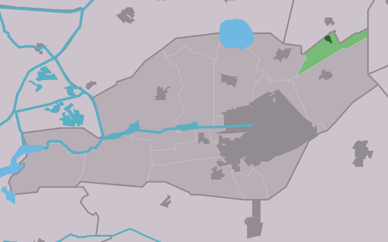 Kaartsje fan himrik fan Houtigehage